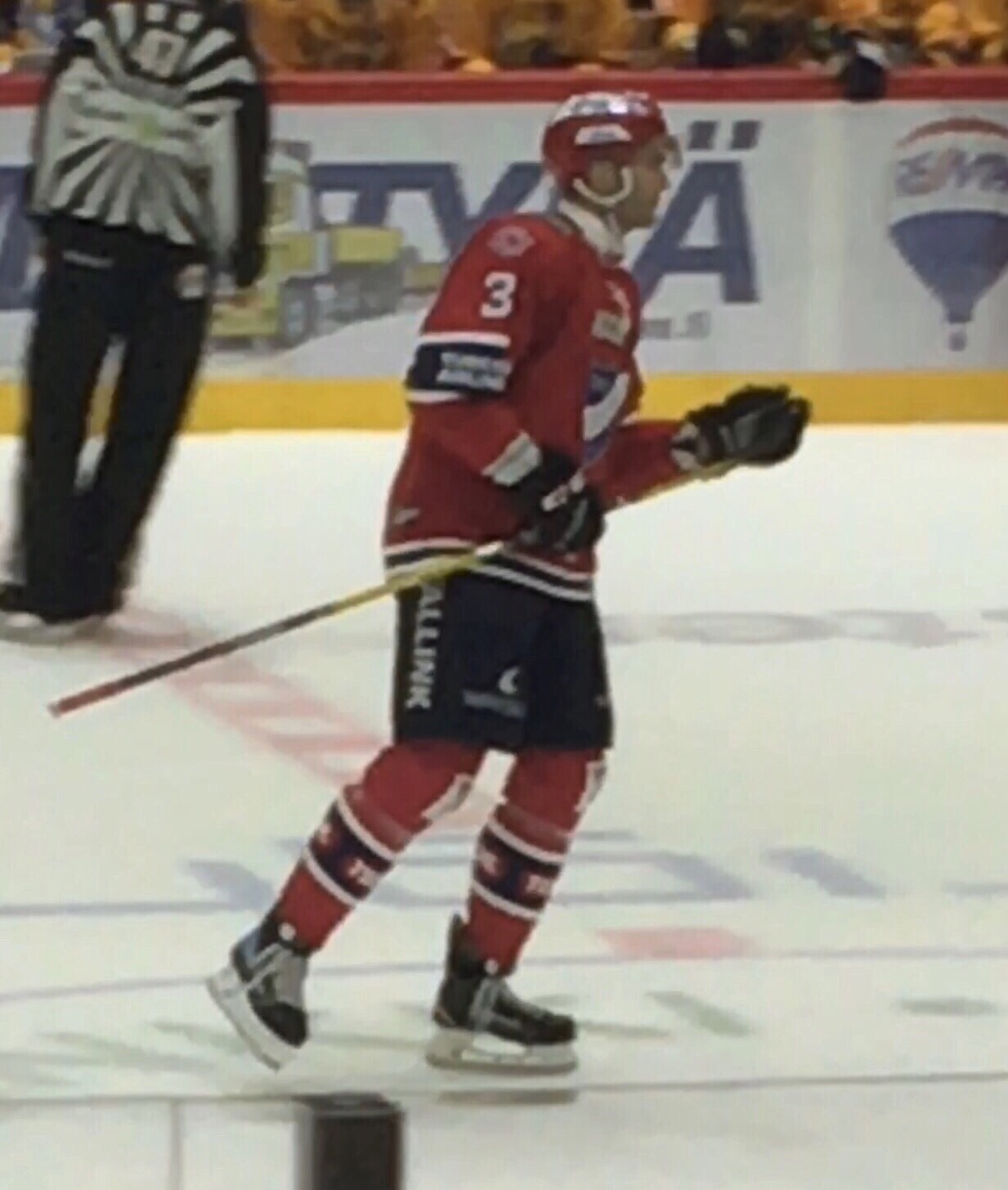 Jääkiekkopuolustaja Joe Finley HIFK:n paidassa 29. syyskuuta 2016 ottelussa Mikkelin Jukureita vastaan.